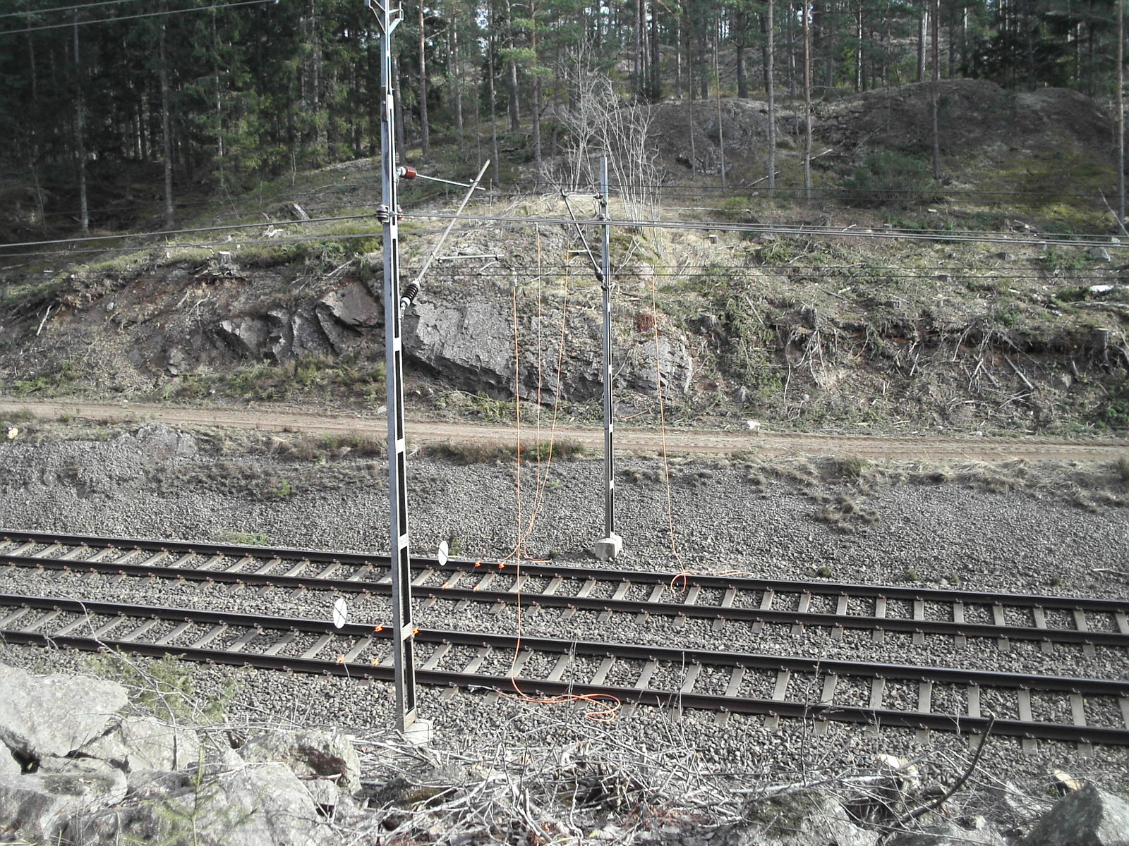 Jordning av kontaktledning